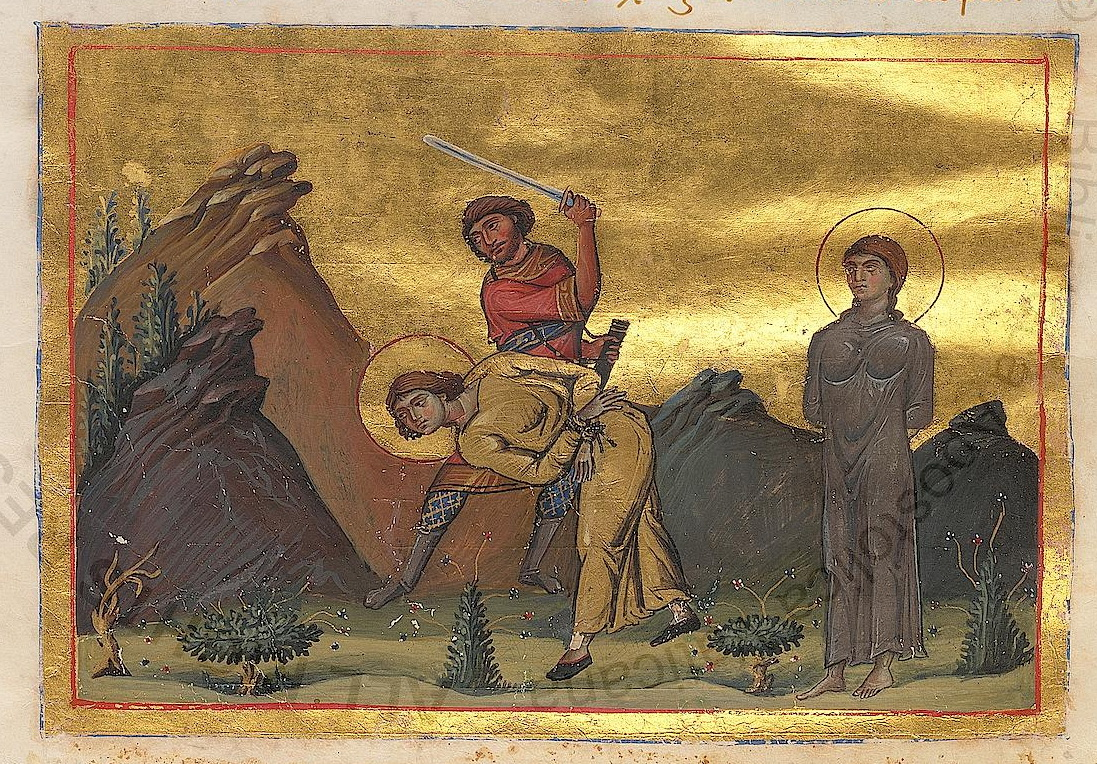 Мученичество святых Евлампия и Евлампии. Миниатюра из Минология Василия II. 976-1025 гг. (Vat. gr. 1613. P. 103)